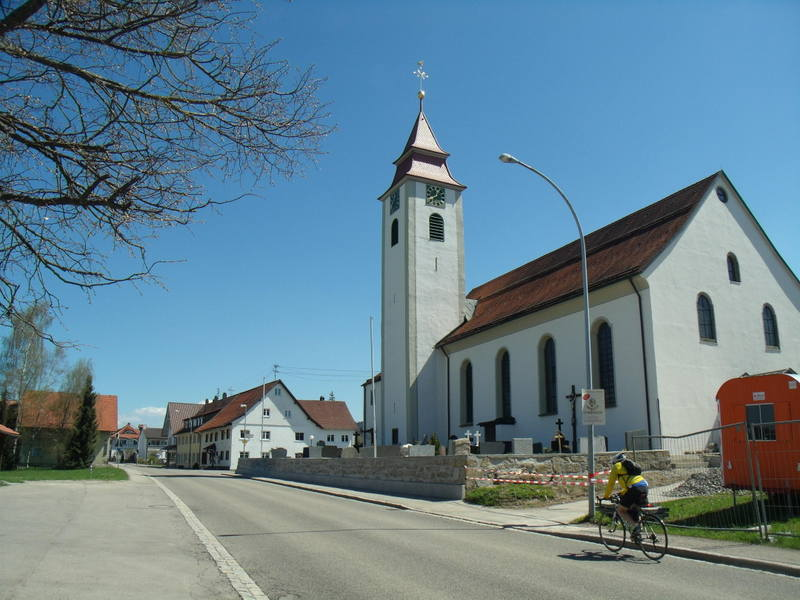 Sigmarszell